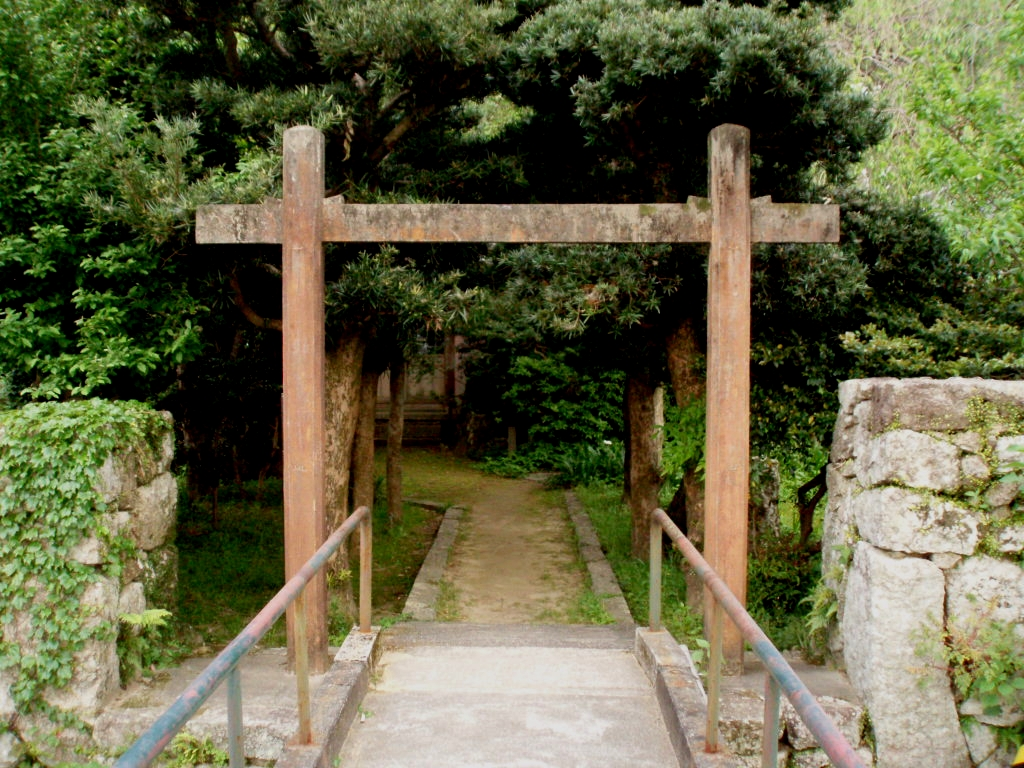 妙心寺廃址の鳥居